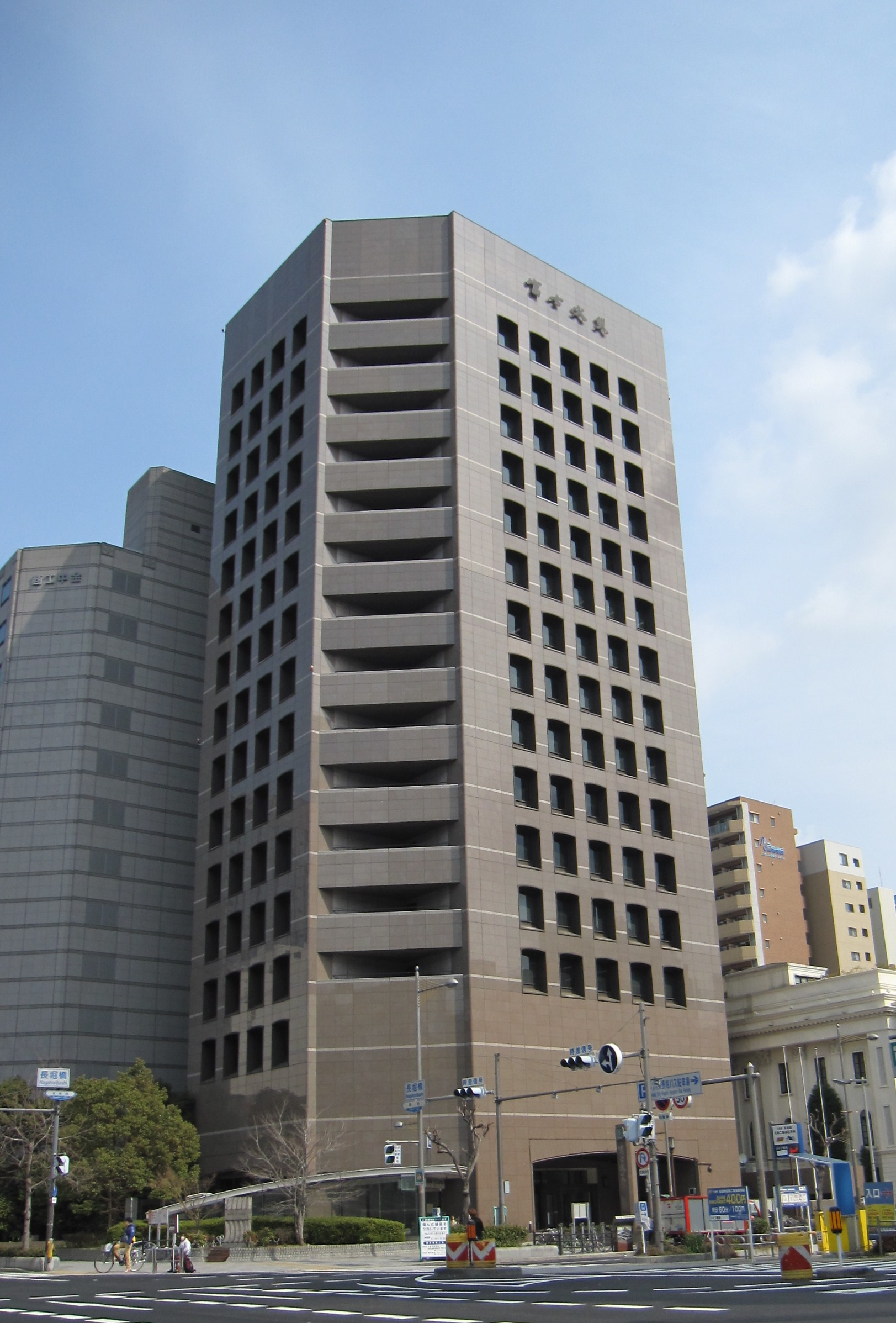 富士火災海上保険本社